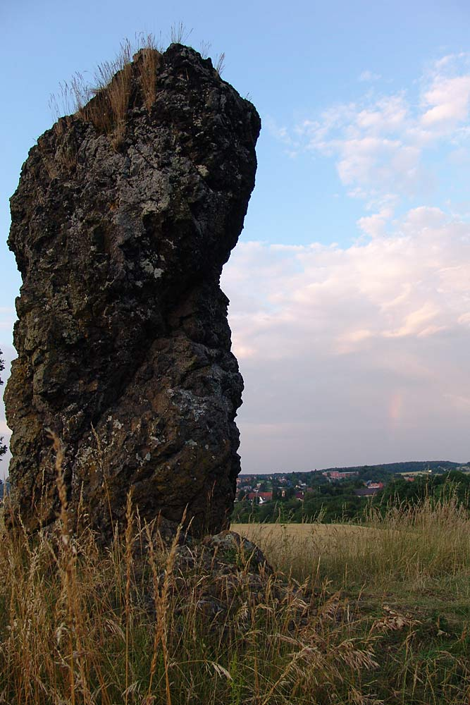 Kopfstein mit Blick auf Fürstenwald